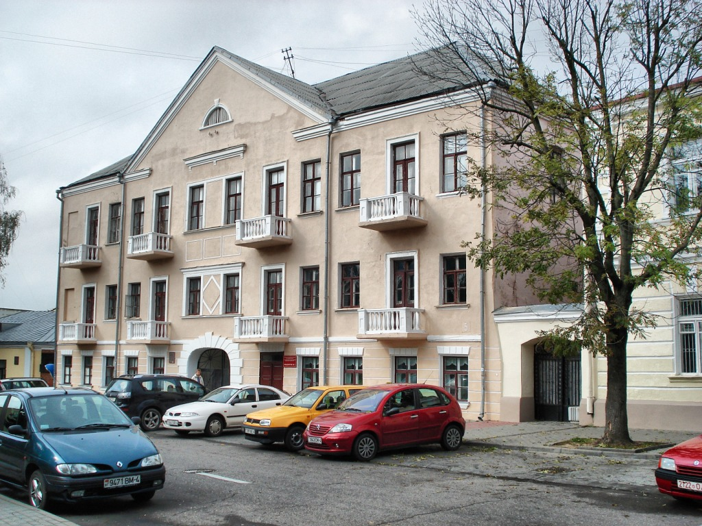 Беларуская (тарашкевіца): Забудова вул. Замкавай, у тым ліку комплекс былога палаца XVIII стагодзьдзя (Храптовіча, Тызэнгаўза, Мучынскага, Ляхніцкага), былы флігель каралеўскіх стайняў і пажарная каланча. г. Горадня This is a photo of Belarusian heritage monument. Reference number: 412Г000014 ( WLM)